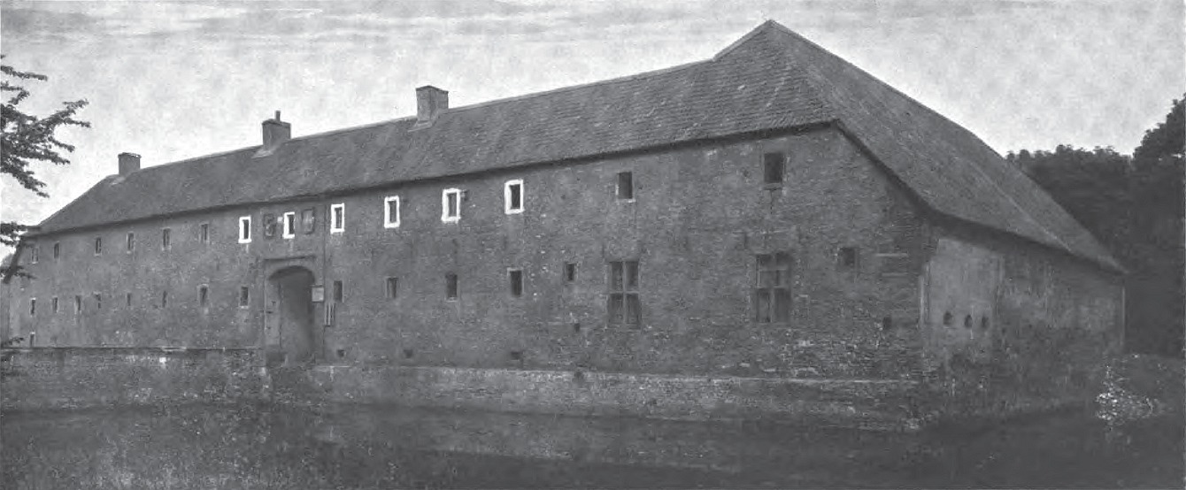 Unterburg des Schlosses Grimberg